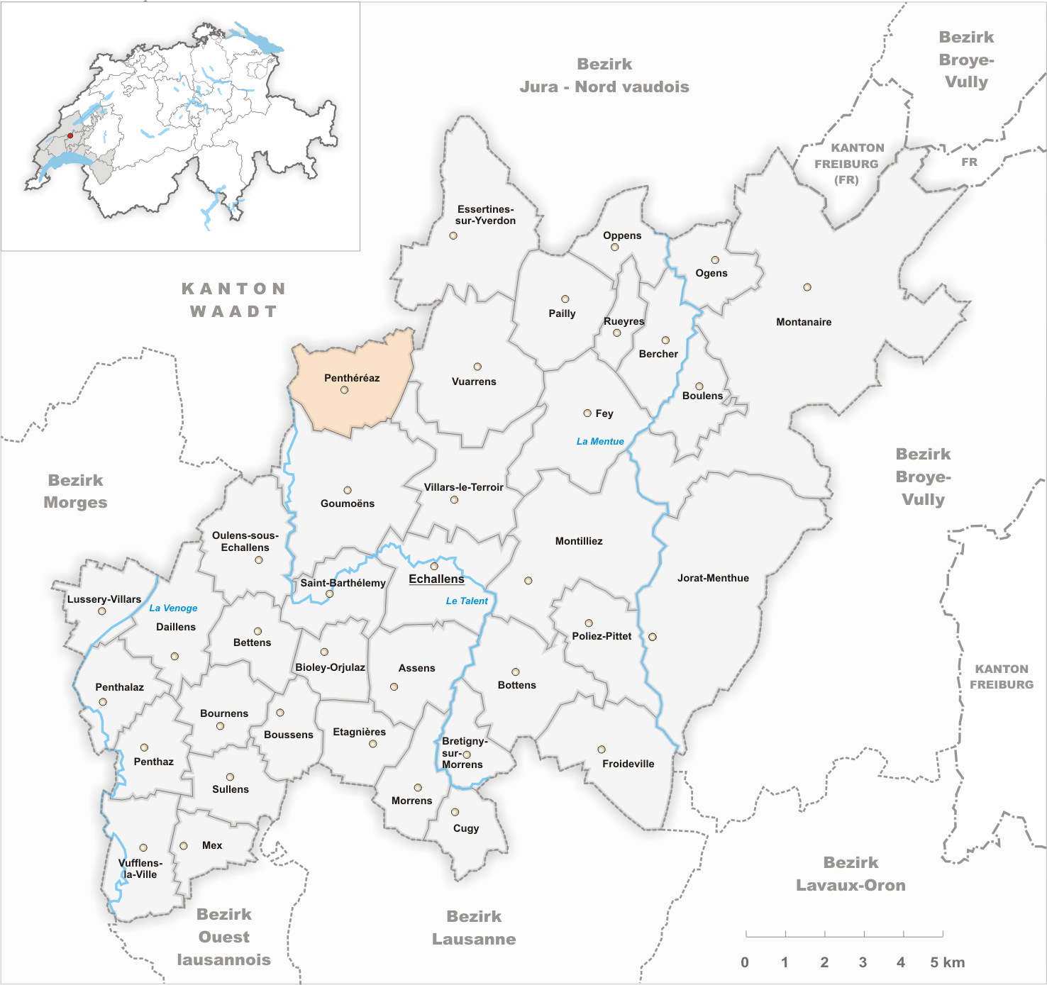 Municipality Penthéréaz